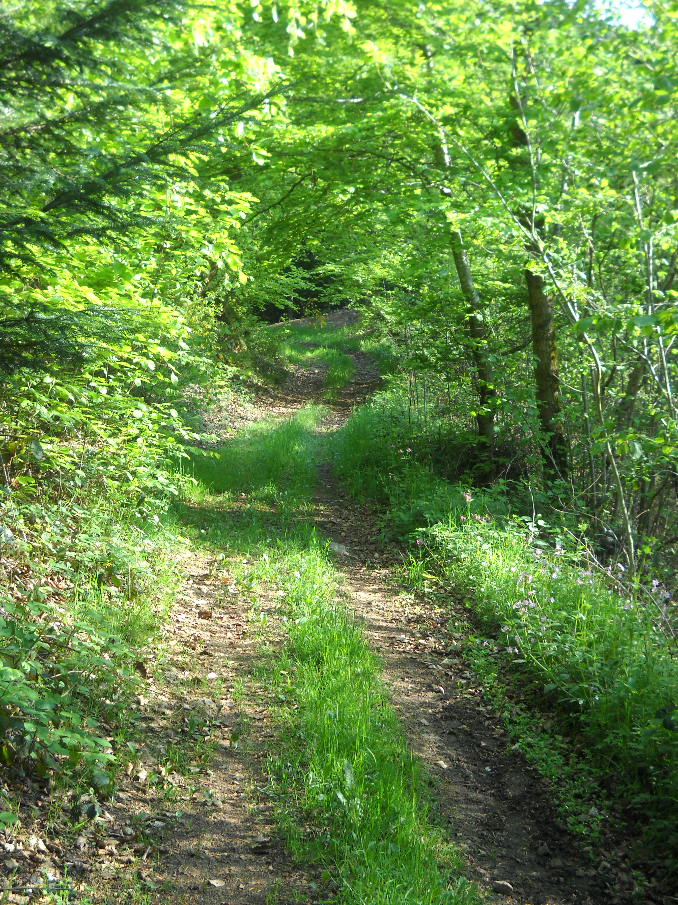 Le sentier pédagogique de La Chabanne (3,5 km/45 min) mène sur les chemins frais et ombragés, à travers une forêt de feuillus et de résineux et offre une vue panoramique sur la vallée de la Besbre.